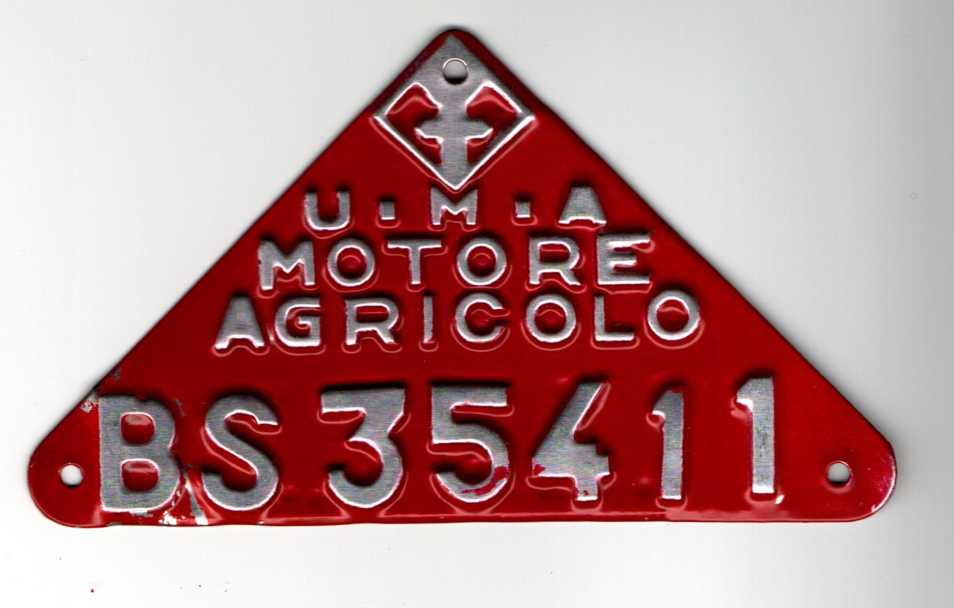 Targa uma